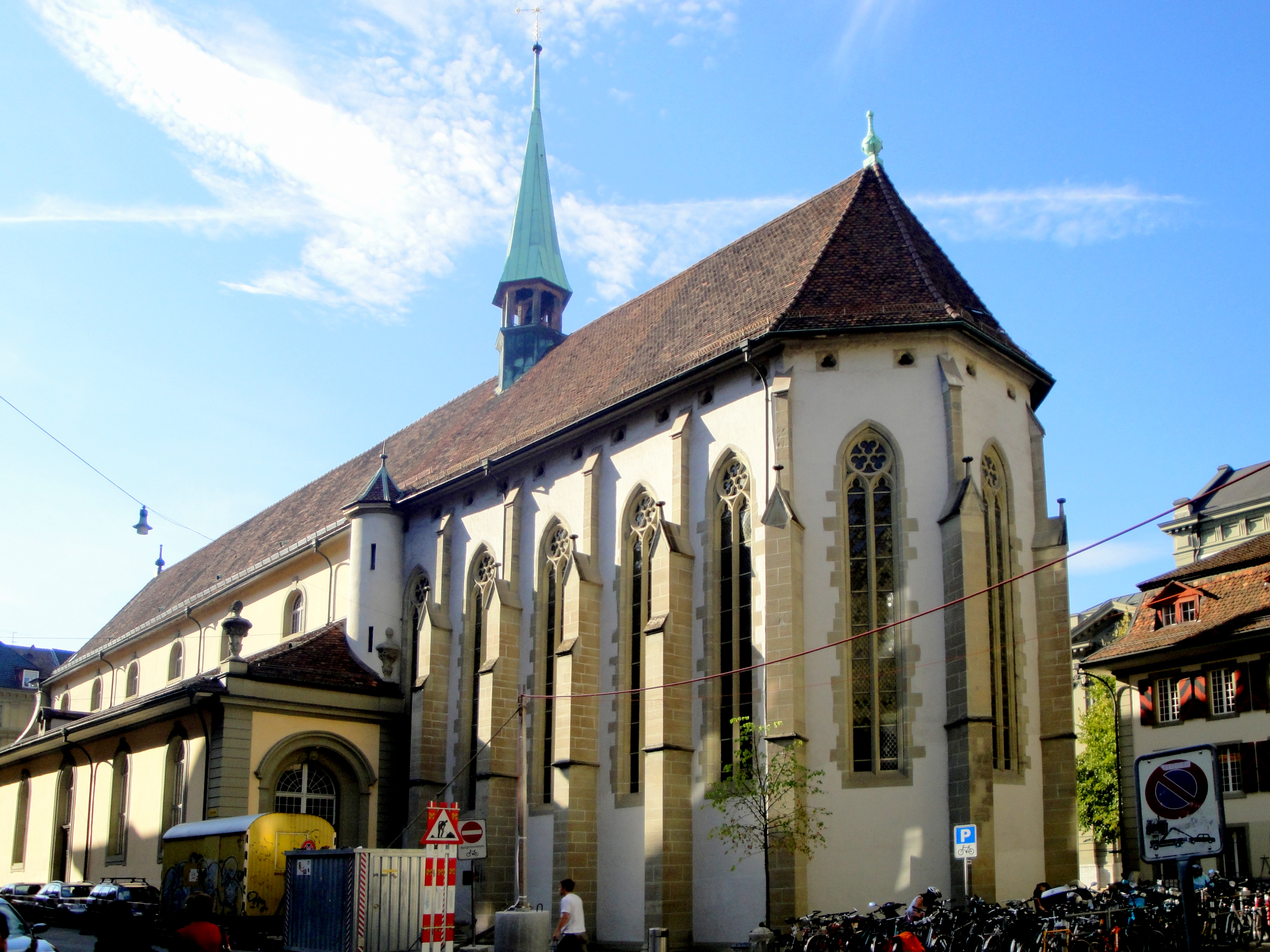 Bern, reformierte französische Kirche